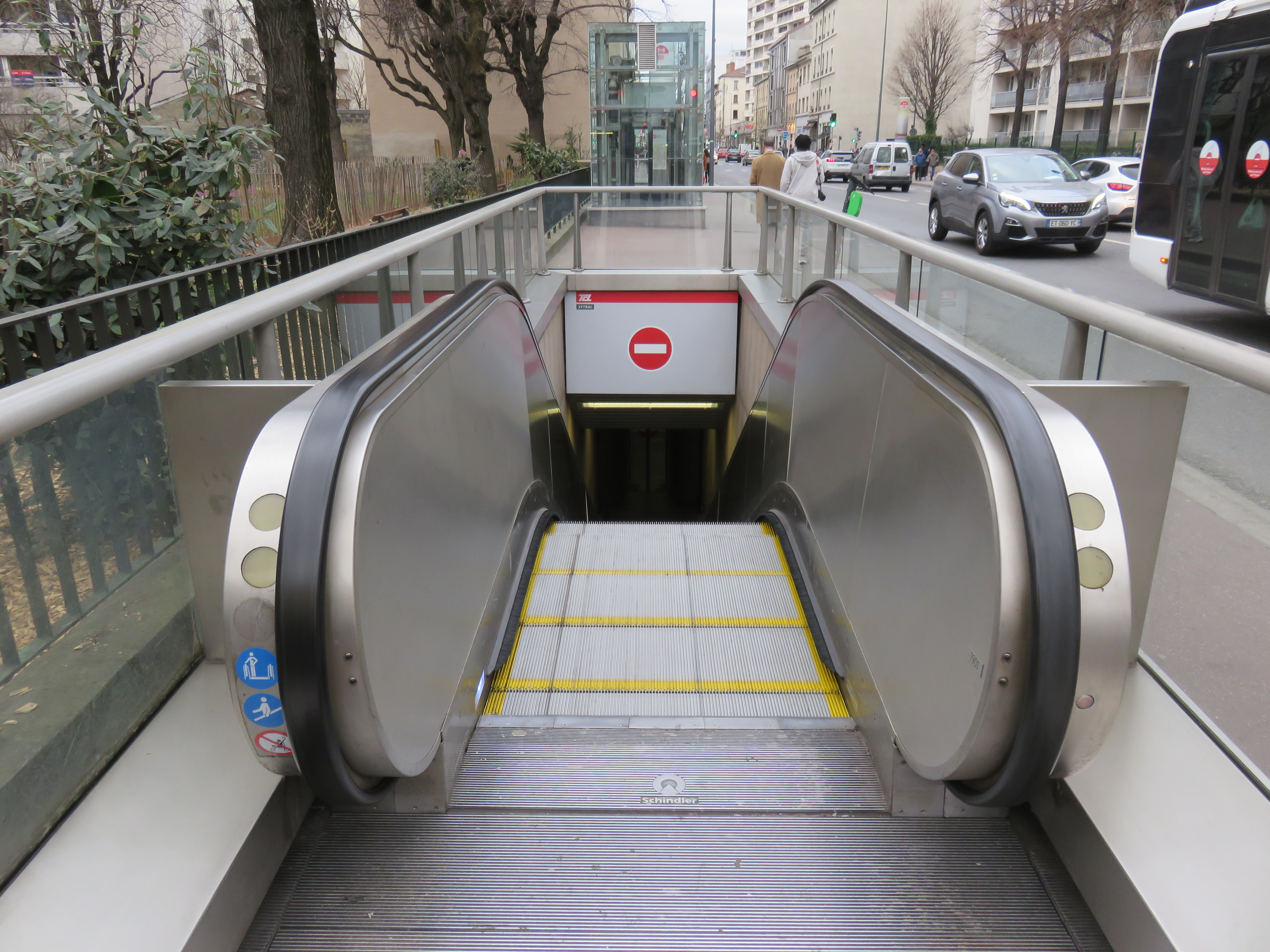 Escalators d'une sortie de la station de métro Gratte-Ciel (ligne A), à Villeurbanne (Rhône, France).